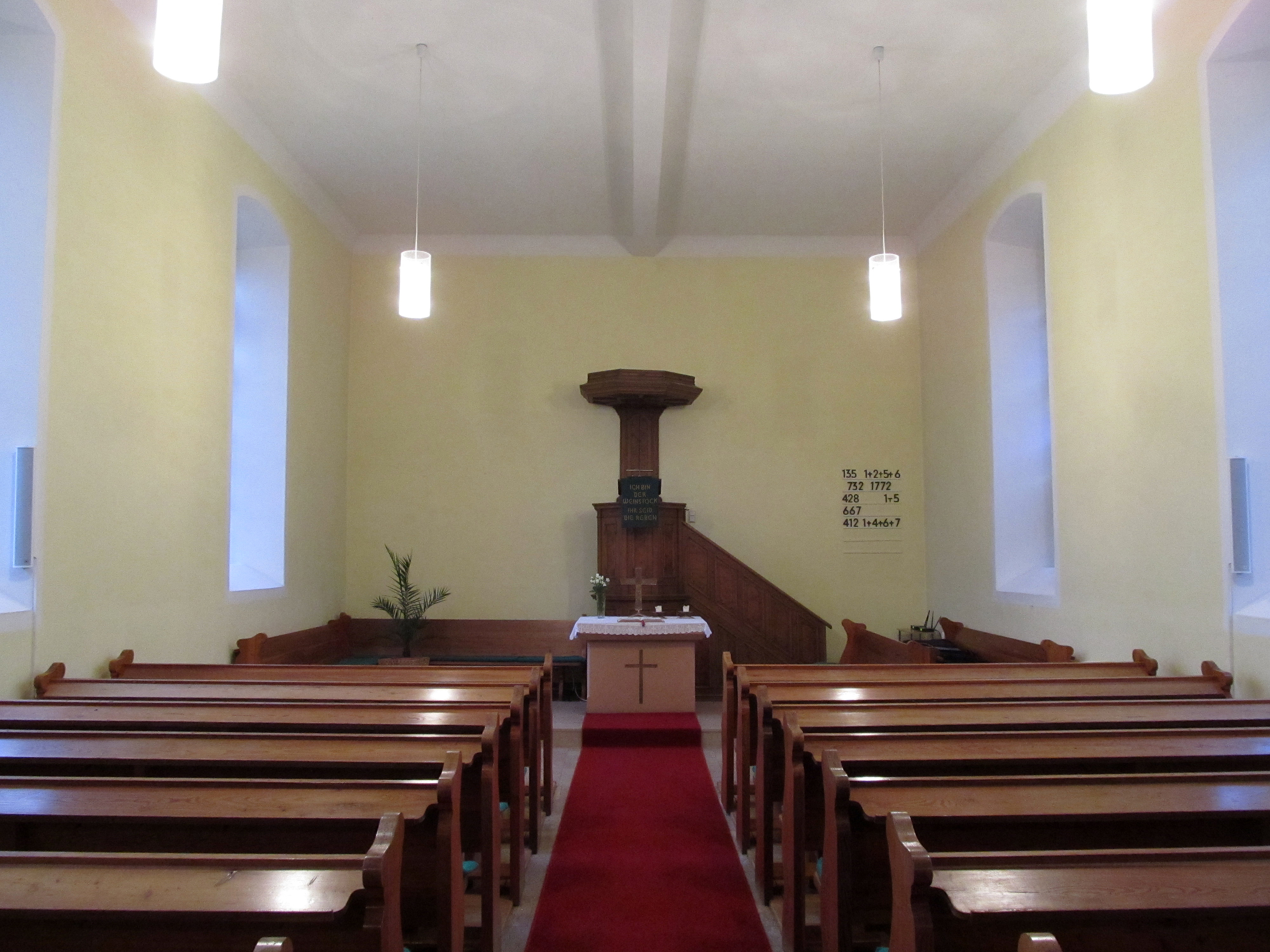 Blick ins Innere der protestantischen Kirche in Breitfurt, einem Stadtteil von Blieskastel, Saarland